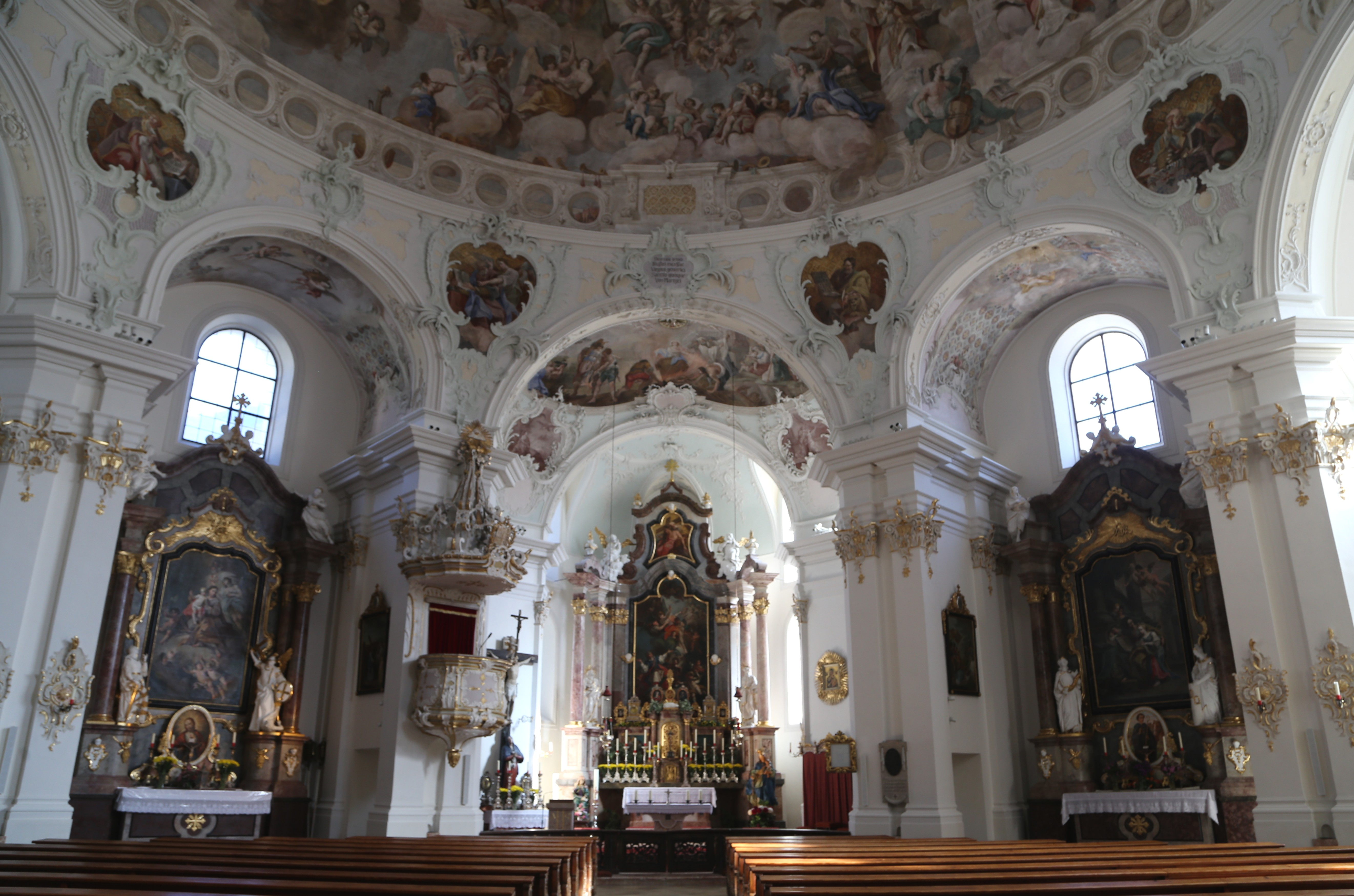 Unterdorf 16, Zell-am-Ziller; Kath. Pfarrkirche hl. Veit